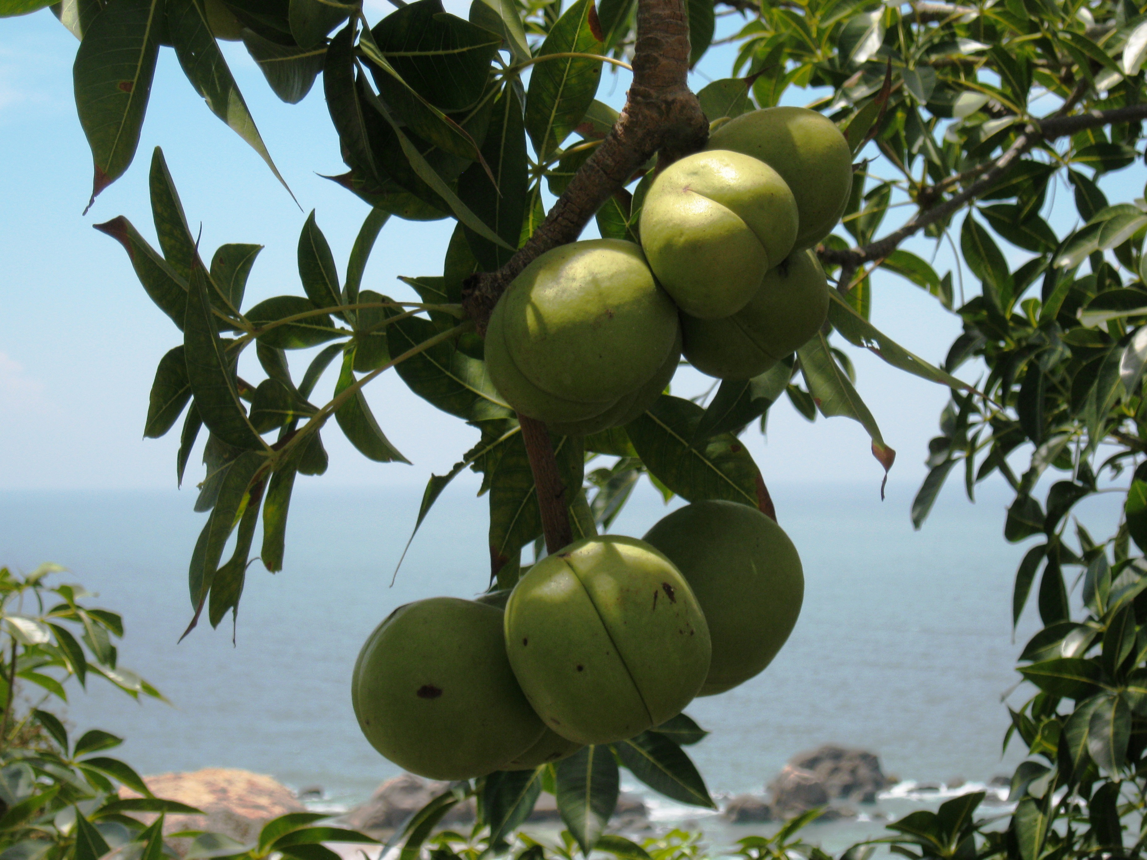 Trái trôm. Thông tin thêm: Cây trôm (tên khoa học: Sterculia foetida L.) mọc nhiều ở Ninh Thuận, Bình Thuận, Khánh Hoà...thuộc Việt Nam.